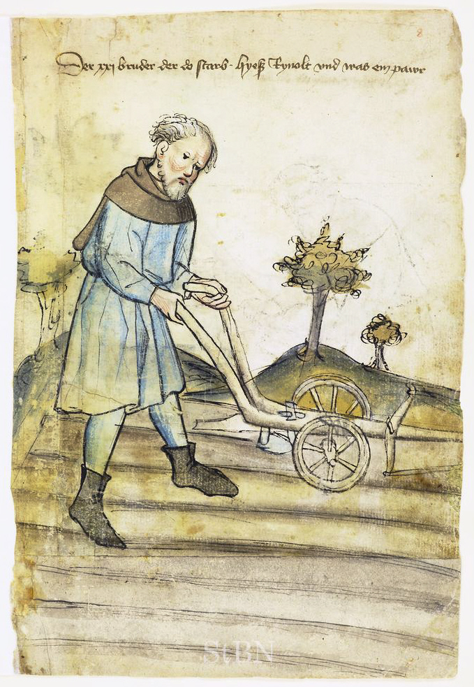 Rynolt (Reinhold) N.N. , pawr (Bauer) Transkription und weitere Informationen